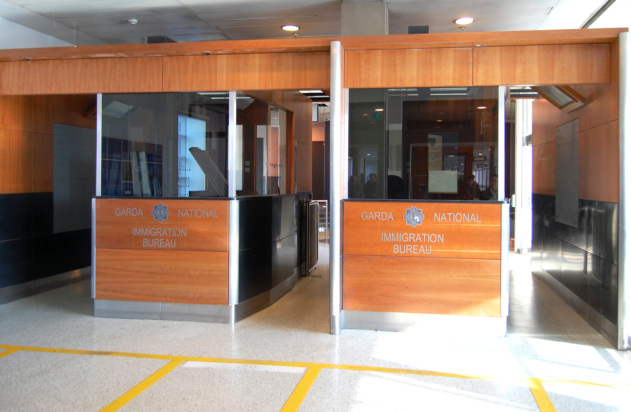 Controle de passaportes no Aeroporto de Dublin, Irlanda.